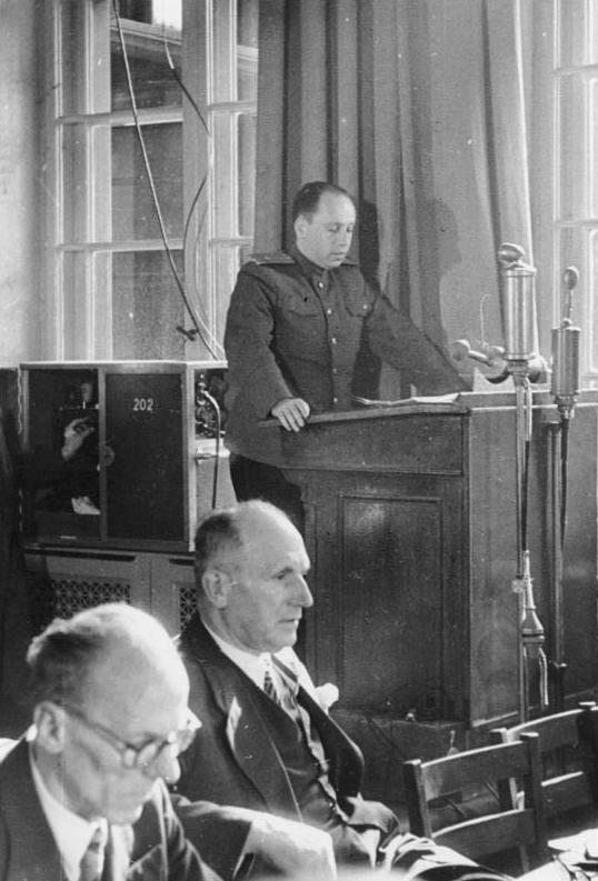 Zentralbild Major Alexander Dymschitz, Professor für Literaturwissenschaft, Offizier in der Kulturabteilung der Sowjetischen Militär-Administration in Deutschland, spricht auf einer Veranstaltung in Berlin im Jahr 1947. 569-47